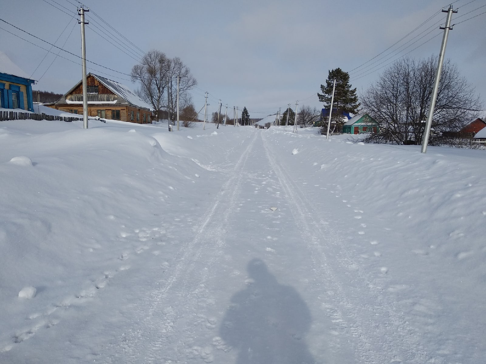 Село Старые Узели, Улица Заречная.